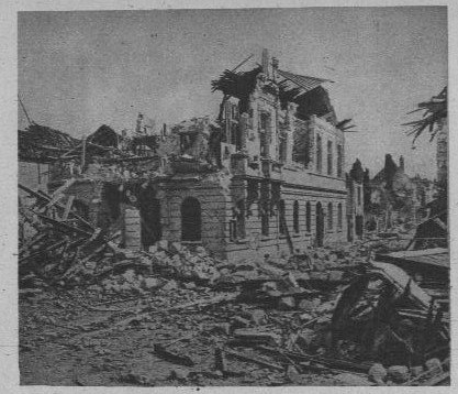 Le Pays De France N°_207_page 5_montrant Fismes_et sa_mairie grandement détruite lors de la Première Guerre mondiale.